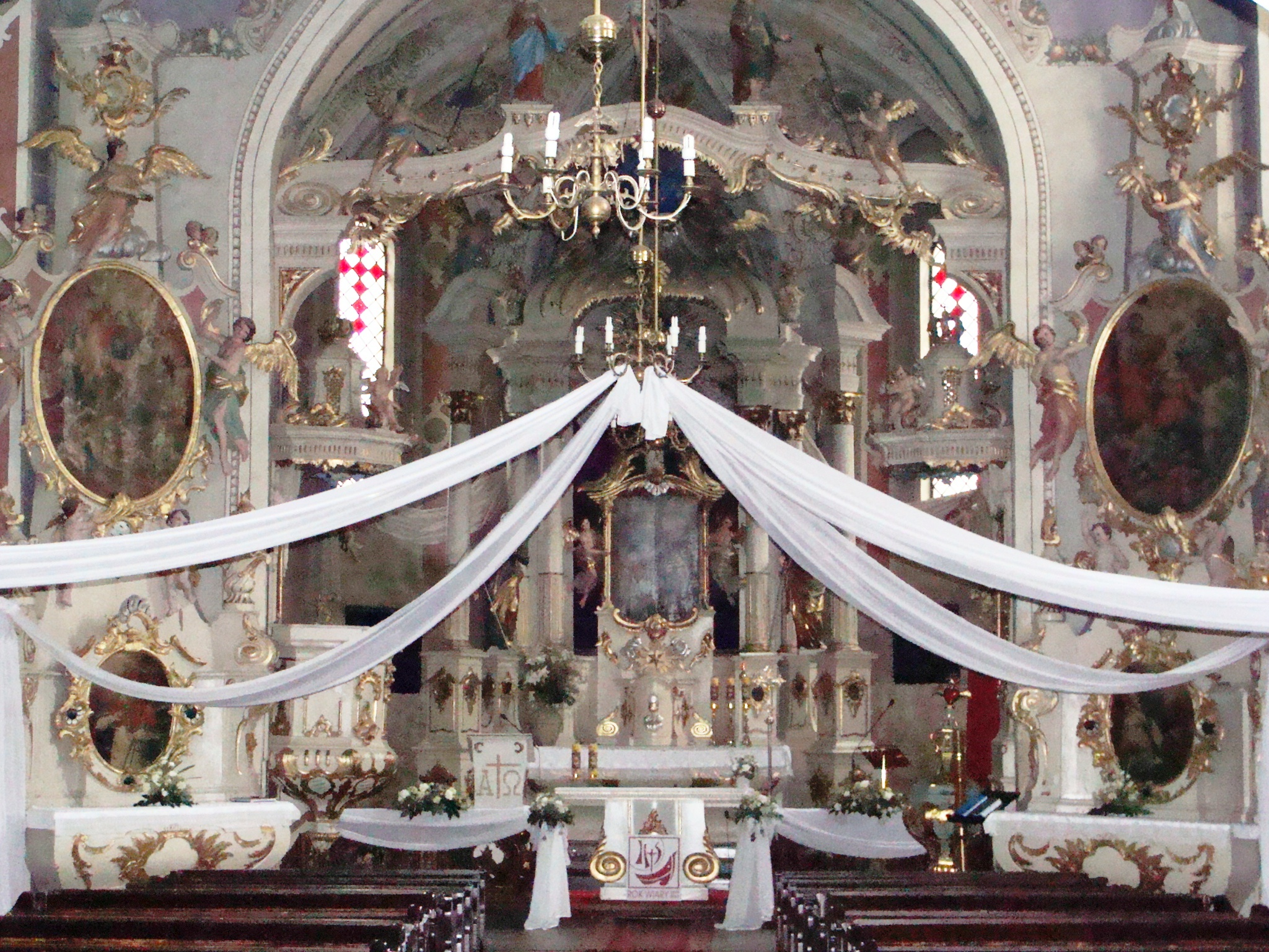 Byszewo, kościół par. p.w. Św. Trójcy, 1663, 2 poł. XVIII